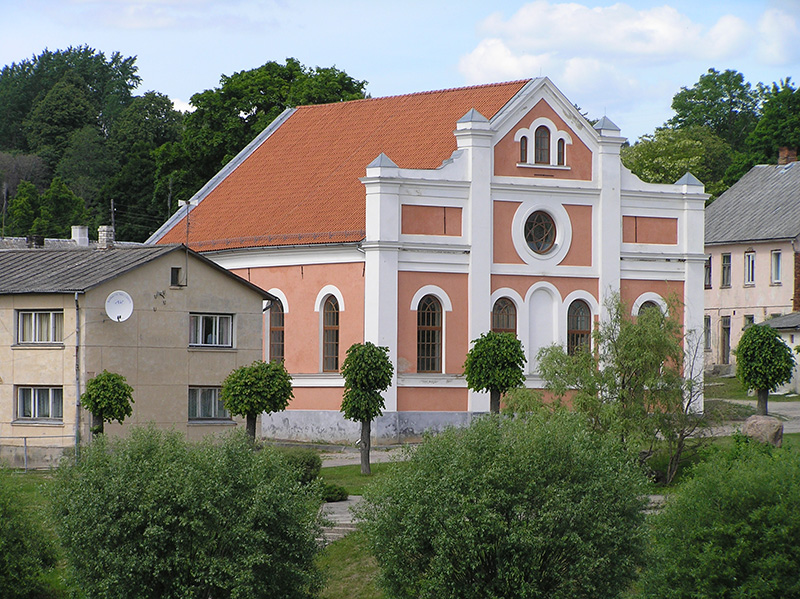 Sabiles sinagoga 2005. gads